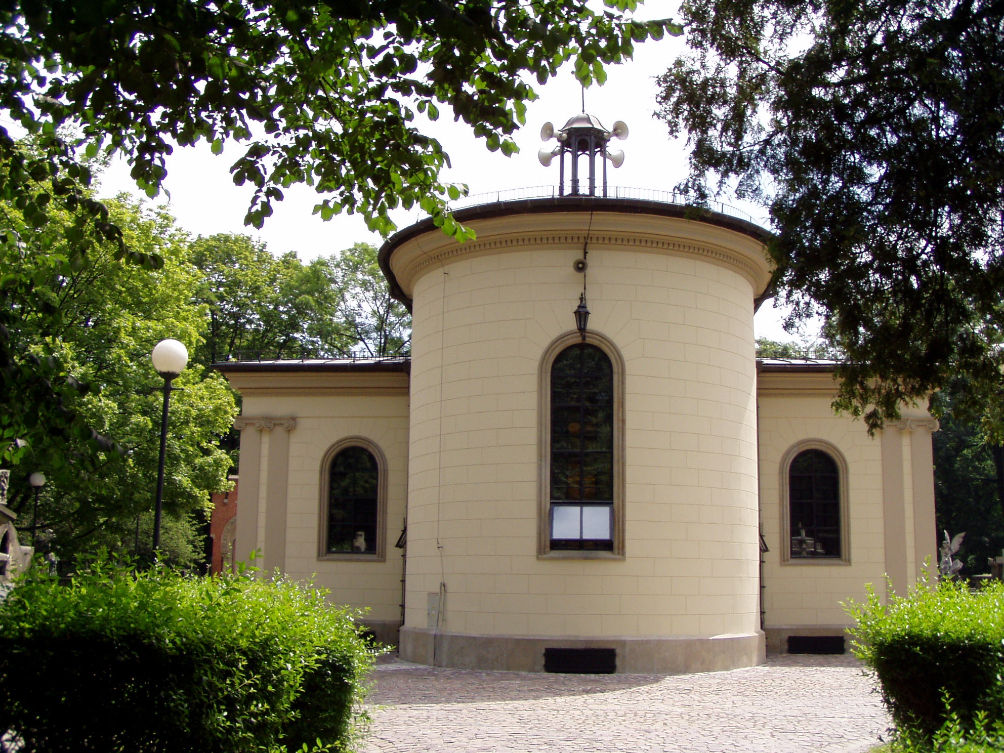 Kaplica na Cmentarzu Rakowickim w Krakowie (tył)/ rear